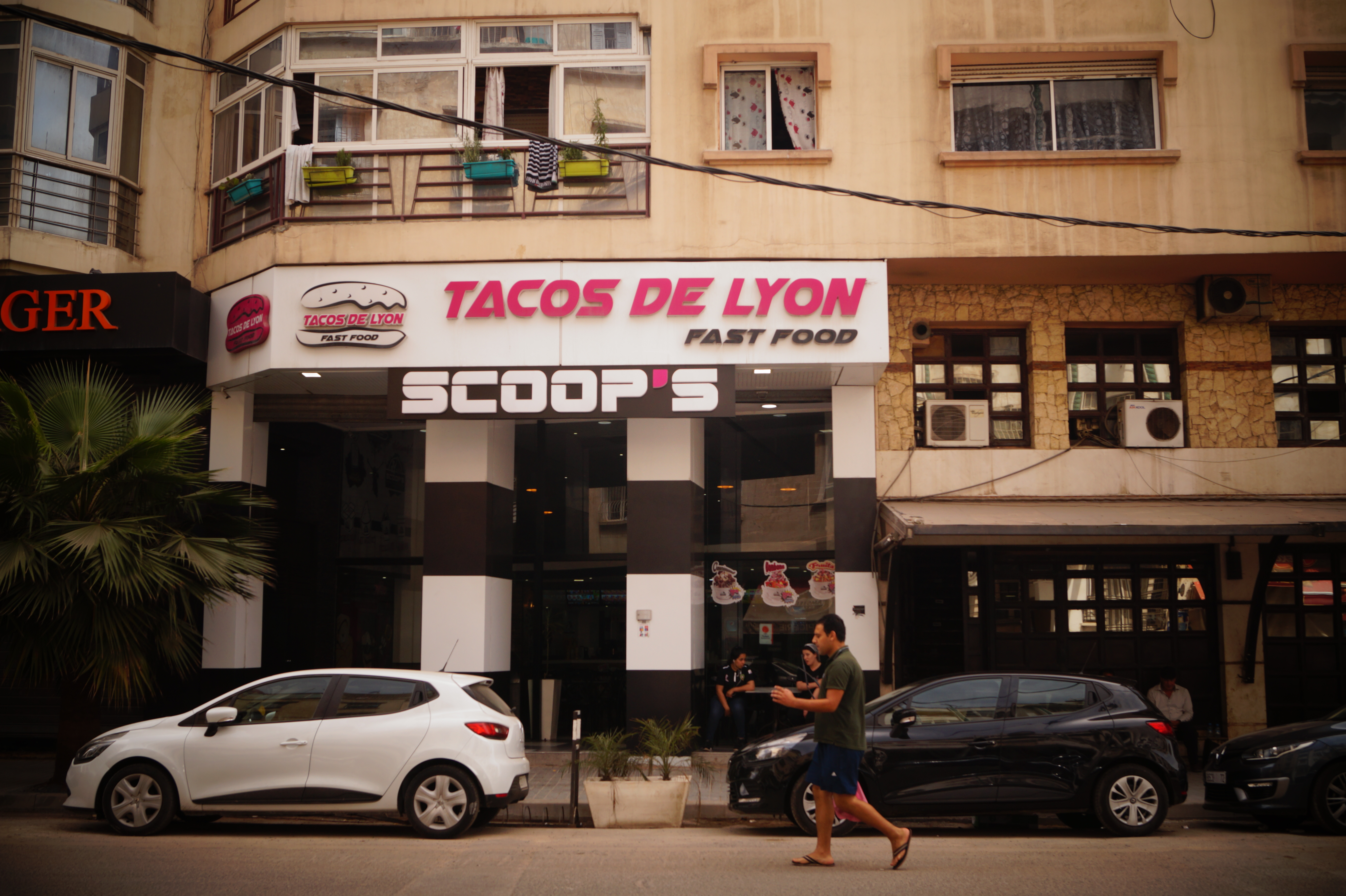 Fachada con letrero de sucursal de Tacos de Lyon, cadena de "tacos franceses", ubicada en la ciudad marroquí de Casablanca